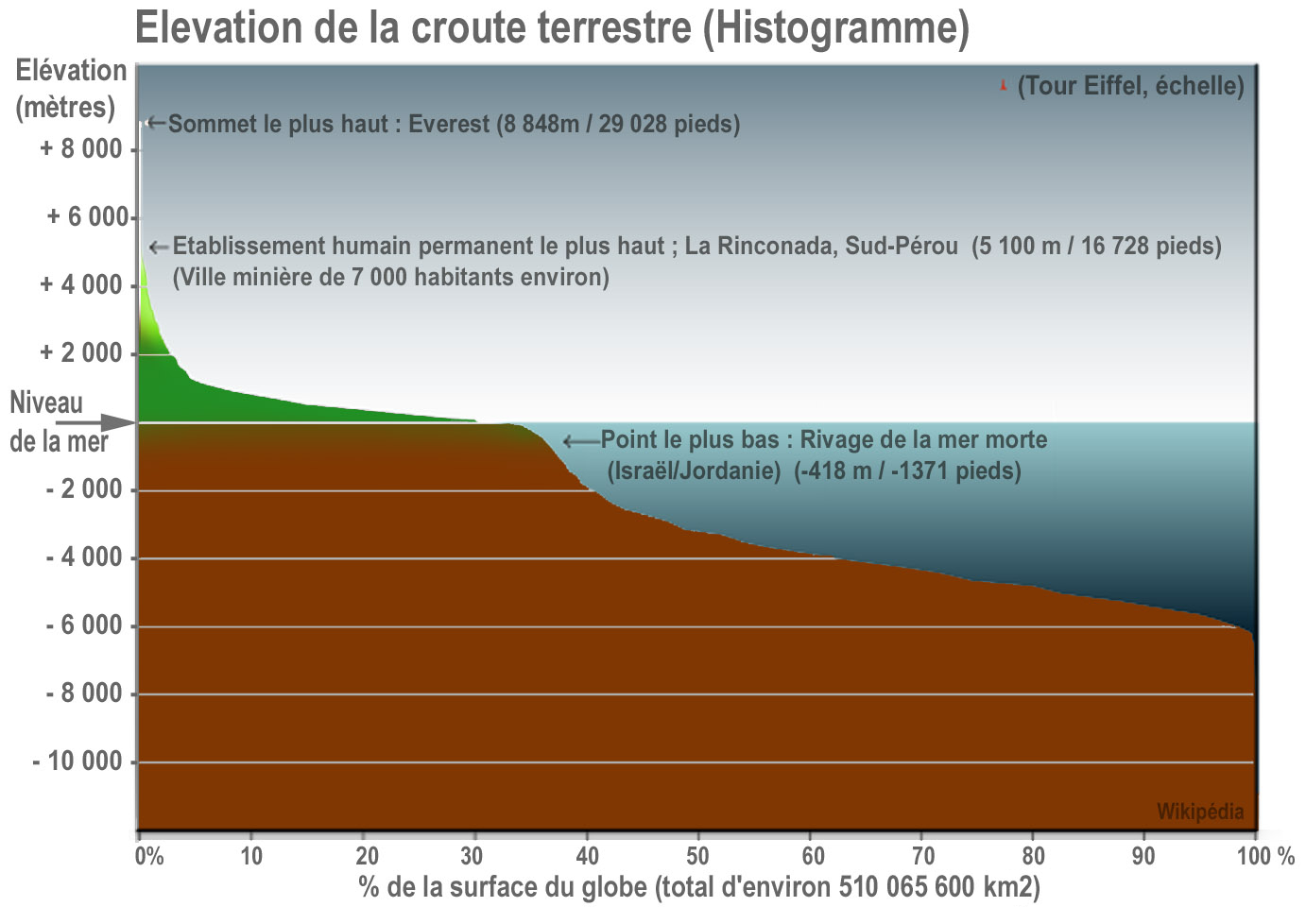 faite sur l'image (légende, échelles...)